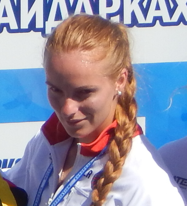 Чемпионат Европы по гребле на байдарках и каноэ. Церемония награждения женщин байдарка-двойка 200 м